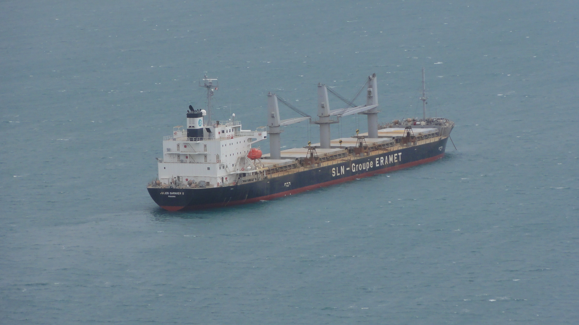 Bâteau de la société Eramet (SLN) à Nouméa près de l'Anse de Nouville (Anse Paddon)